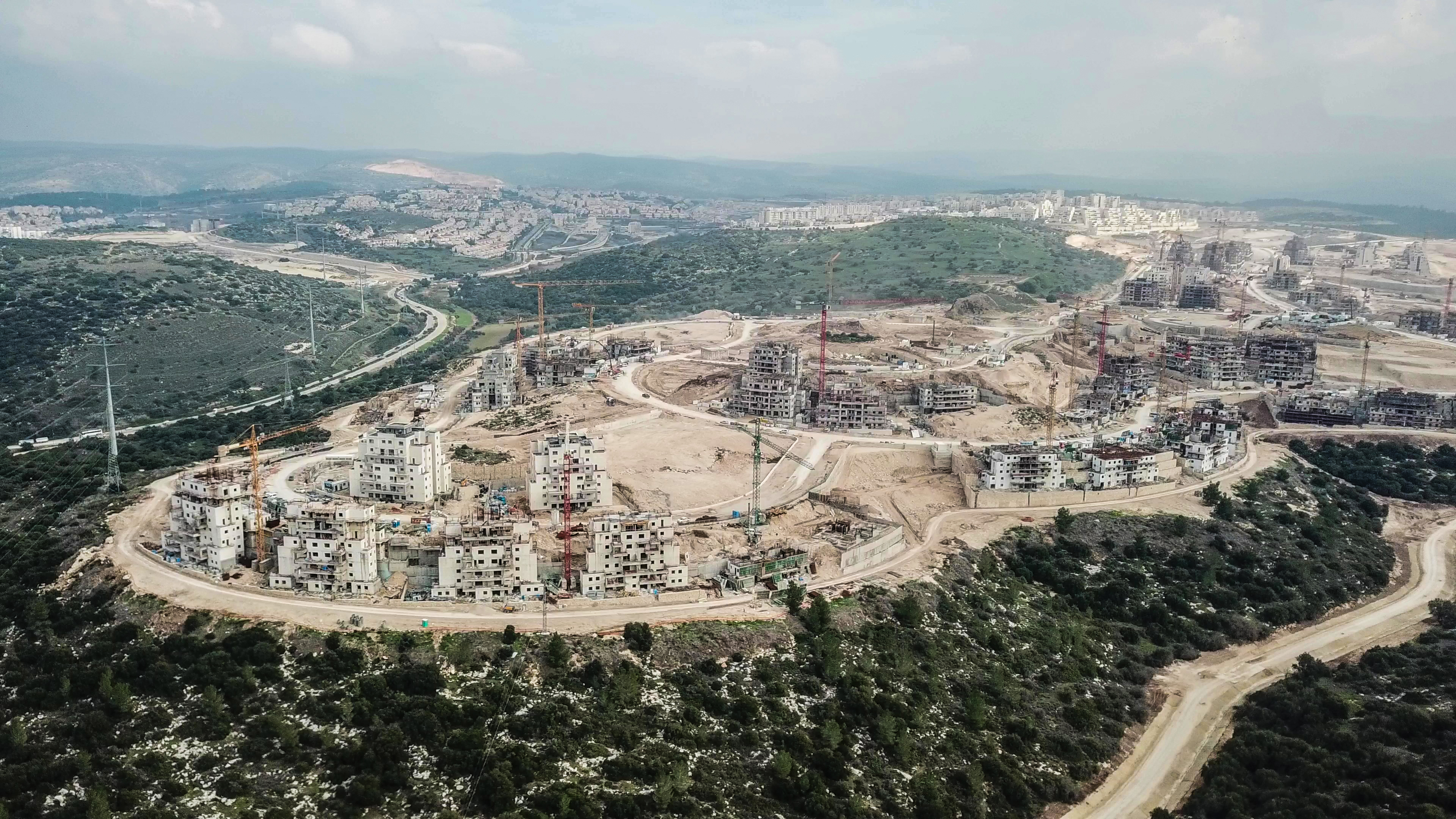 רמת בית שמש ד' פברואר 2020